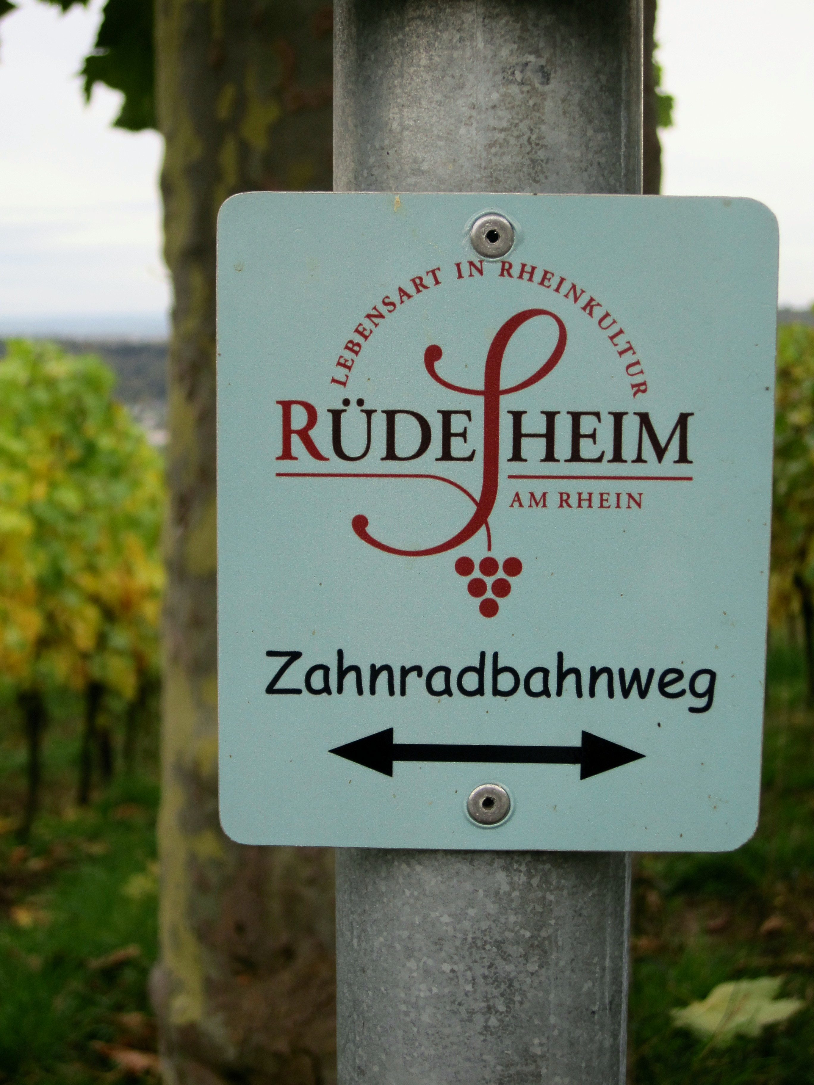 Informationsweg zur ehemaligen Zahnradbahn (Niederwaldbahn) von Rüdesheim am Rhein zum Niederwalddenkmal.